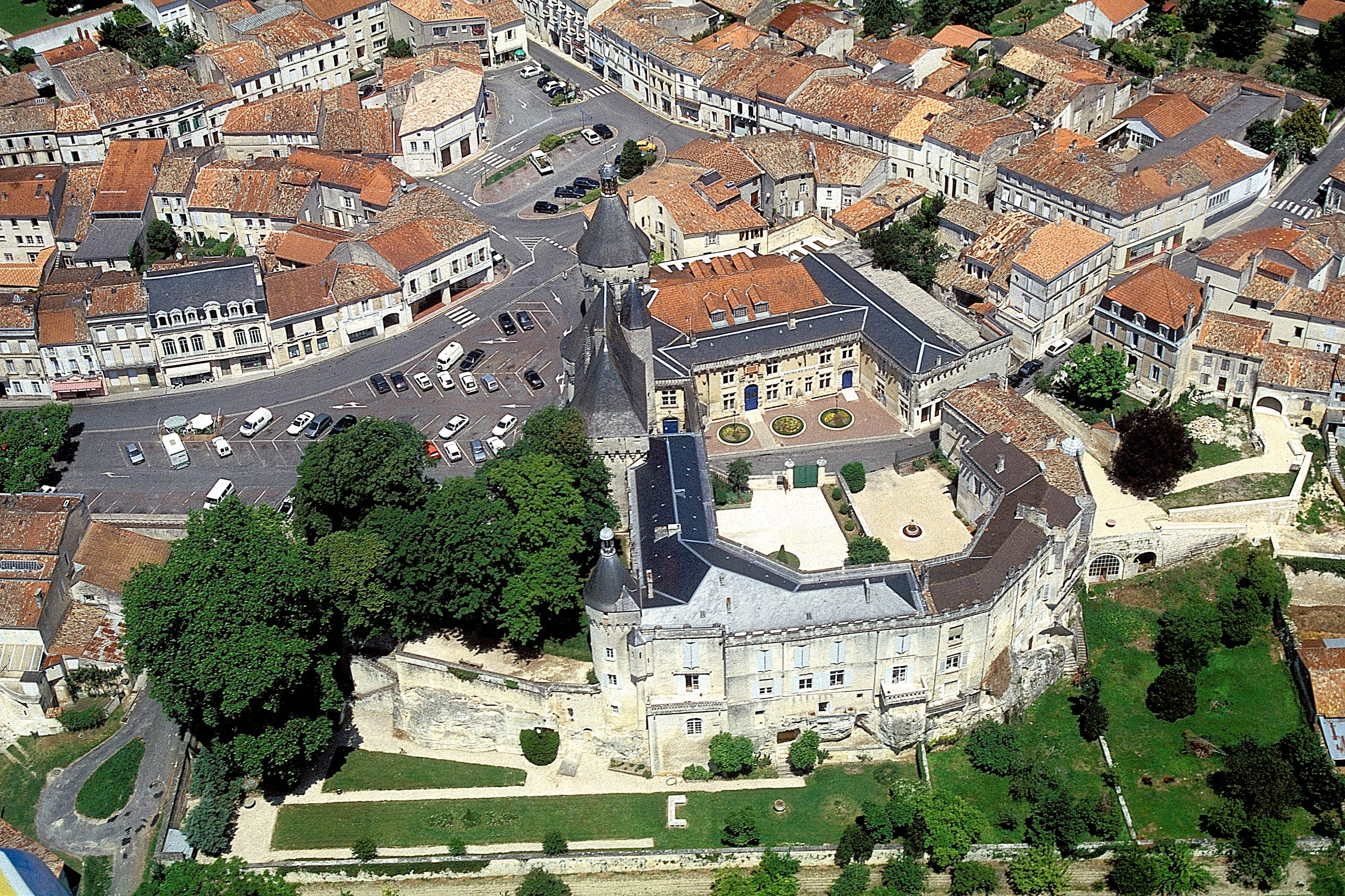 Jonzac C-M Le Chateau. Dominant la Seugne, ses structures initiales datent du 11ème siècle et il fut restauré au 15ème siècle. Actuellement siège de la Sous-préfecture et d'un Centre culturel, il est l'objet d'une importante fréquentation touristique. .